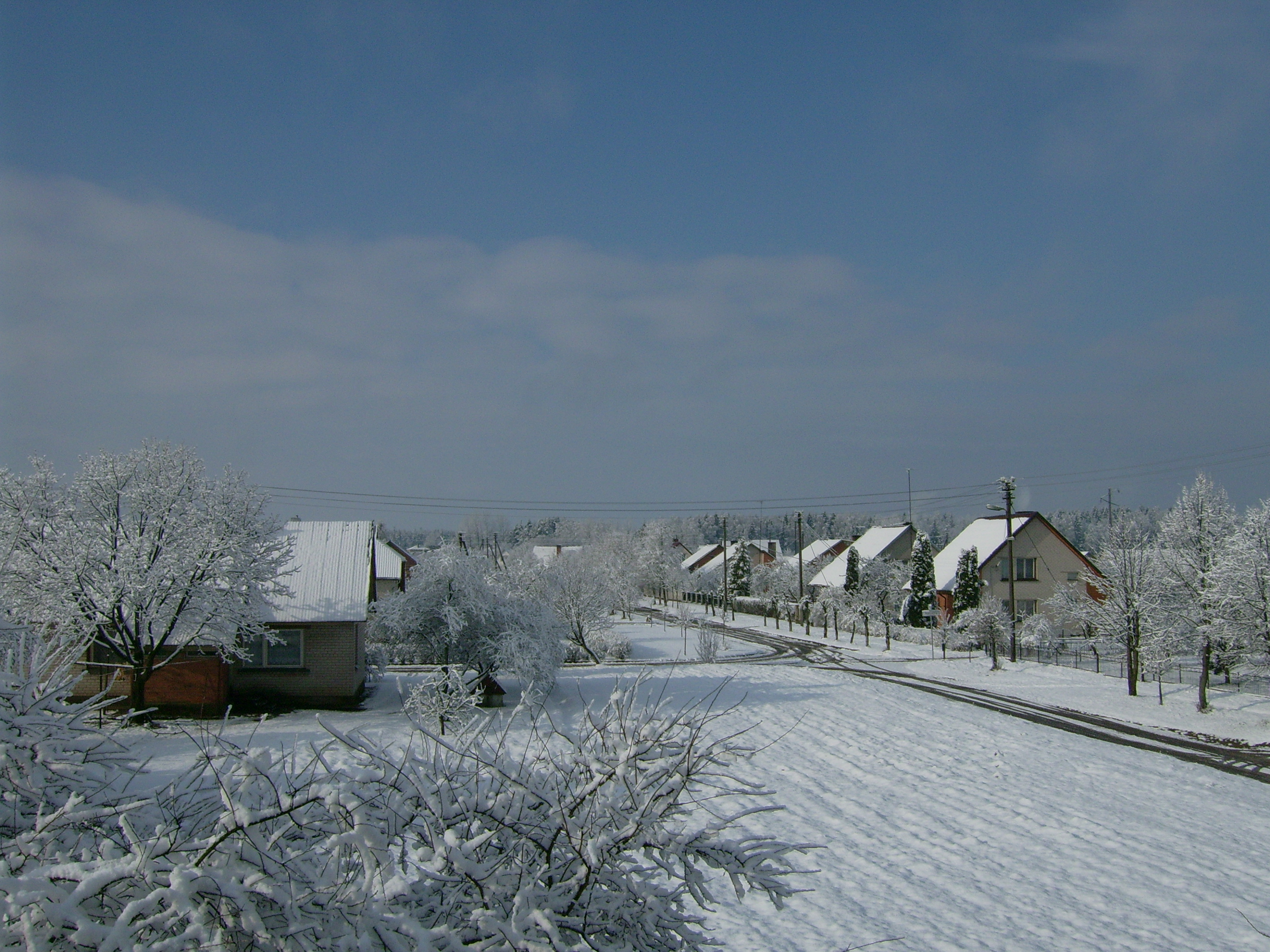 Mažonai žiemą